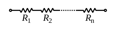 متوالی